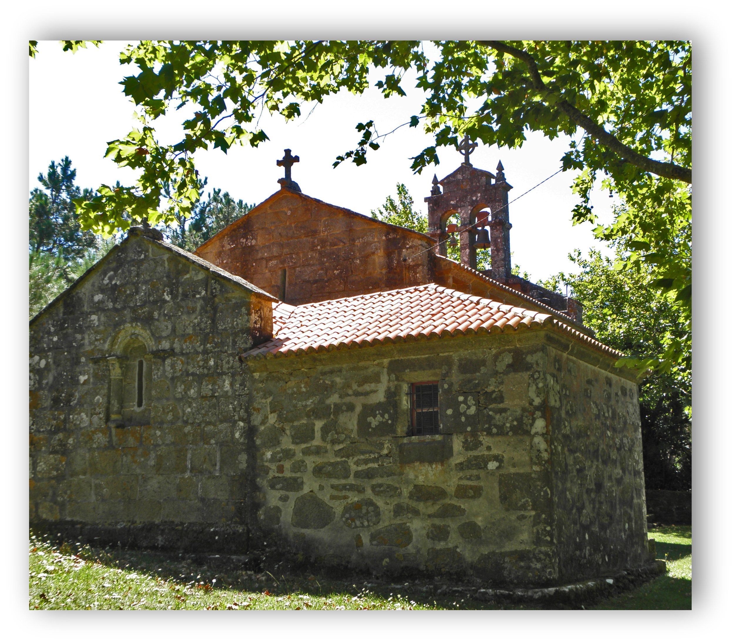 Igrexa de San Pedro da Redonda (Corcubión)